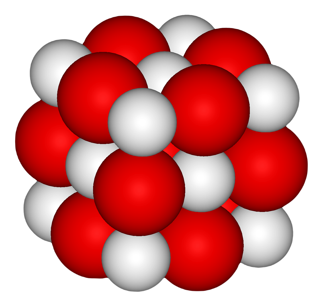 Óxido de calcio